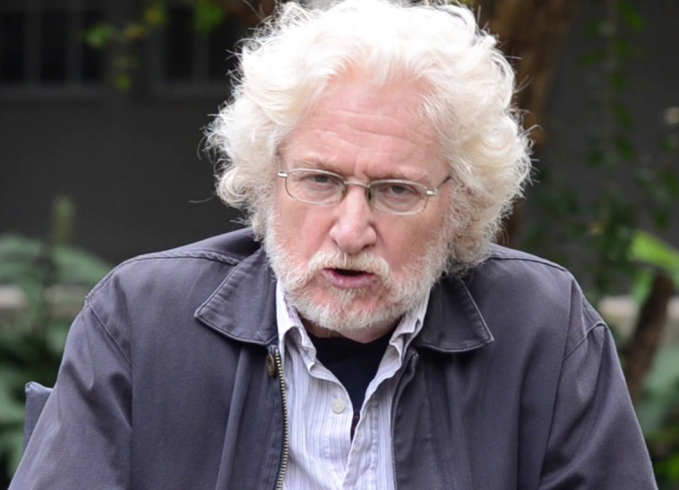 Antropologo y autor Especialista en la cuestión indígena